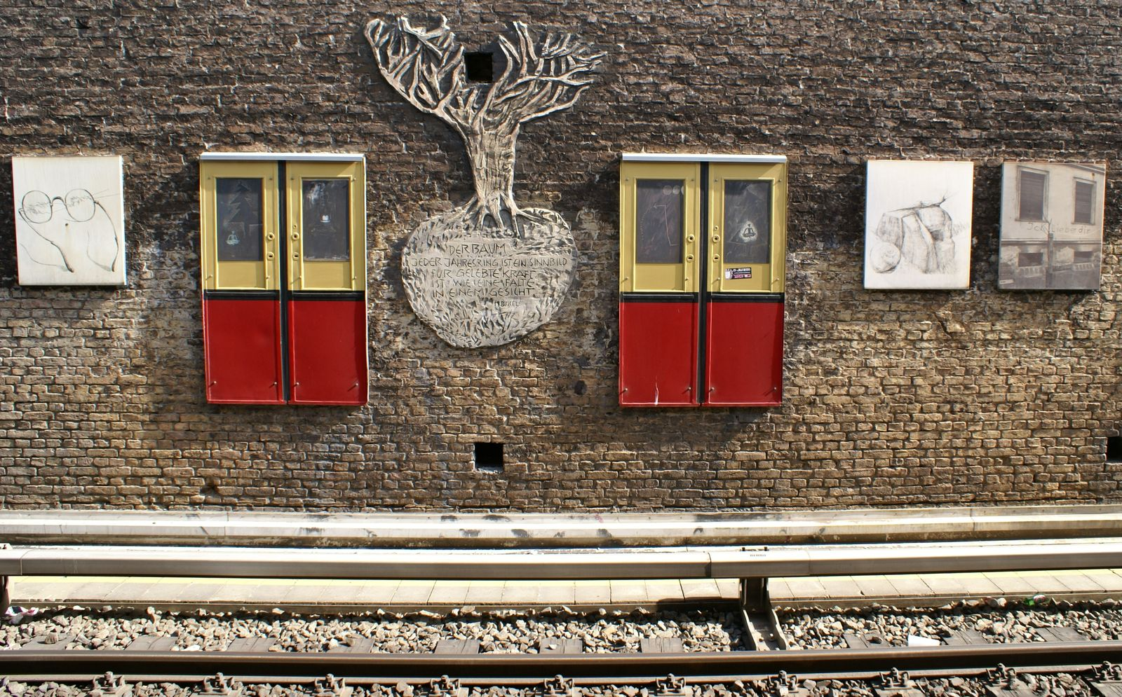 "Werden, Sein, Vergehen" von Siegfried Rischar im Berliner S-Bahnhof Savignyplatz